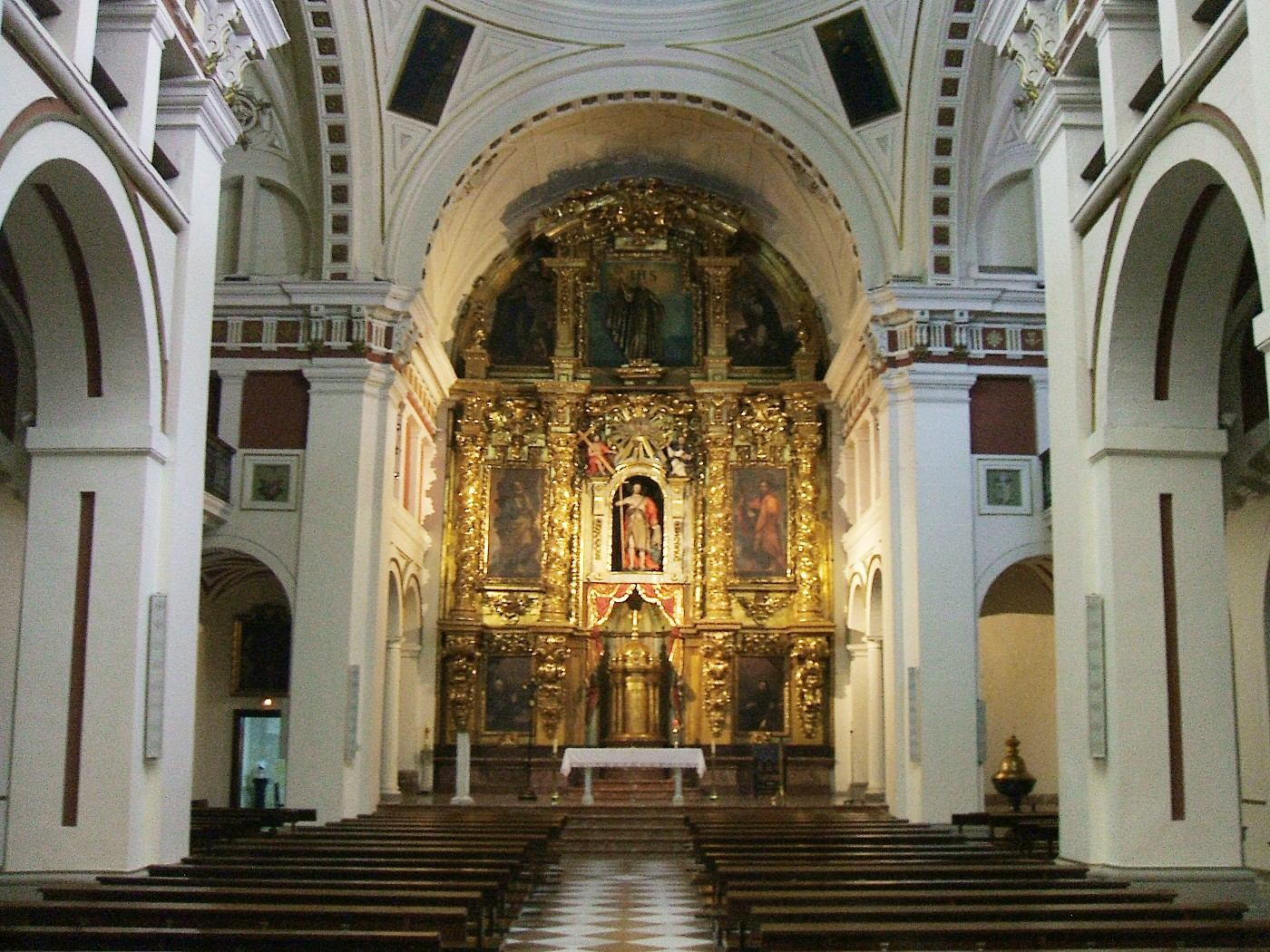 Cabecera de la iglesia barroca de los Santos Juanes, Bilbao